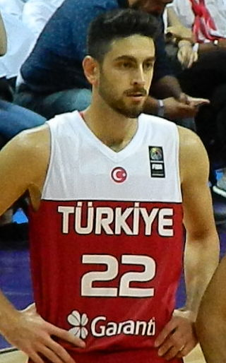 Doğuş Balbay & Furkan Korkmaz 20170902